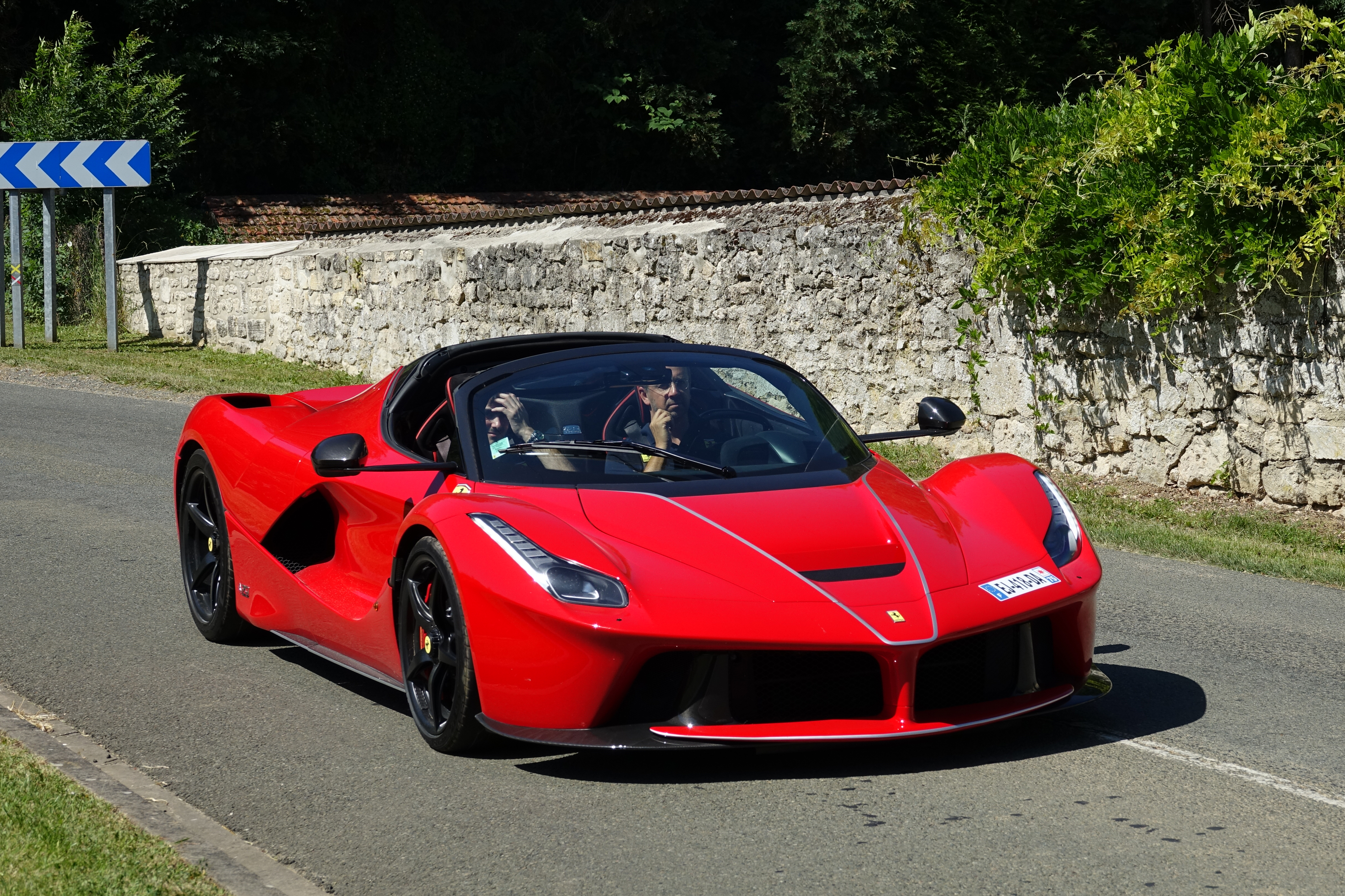 Rallye Supercars au Chantilly Arts & Elegance Richard Mille 2019